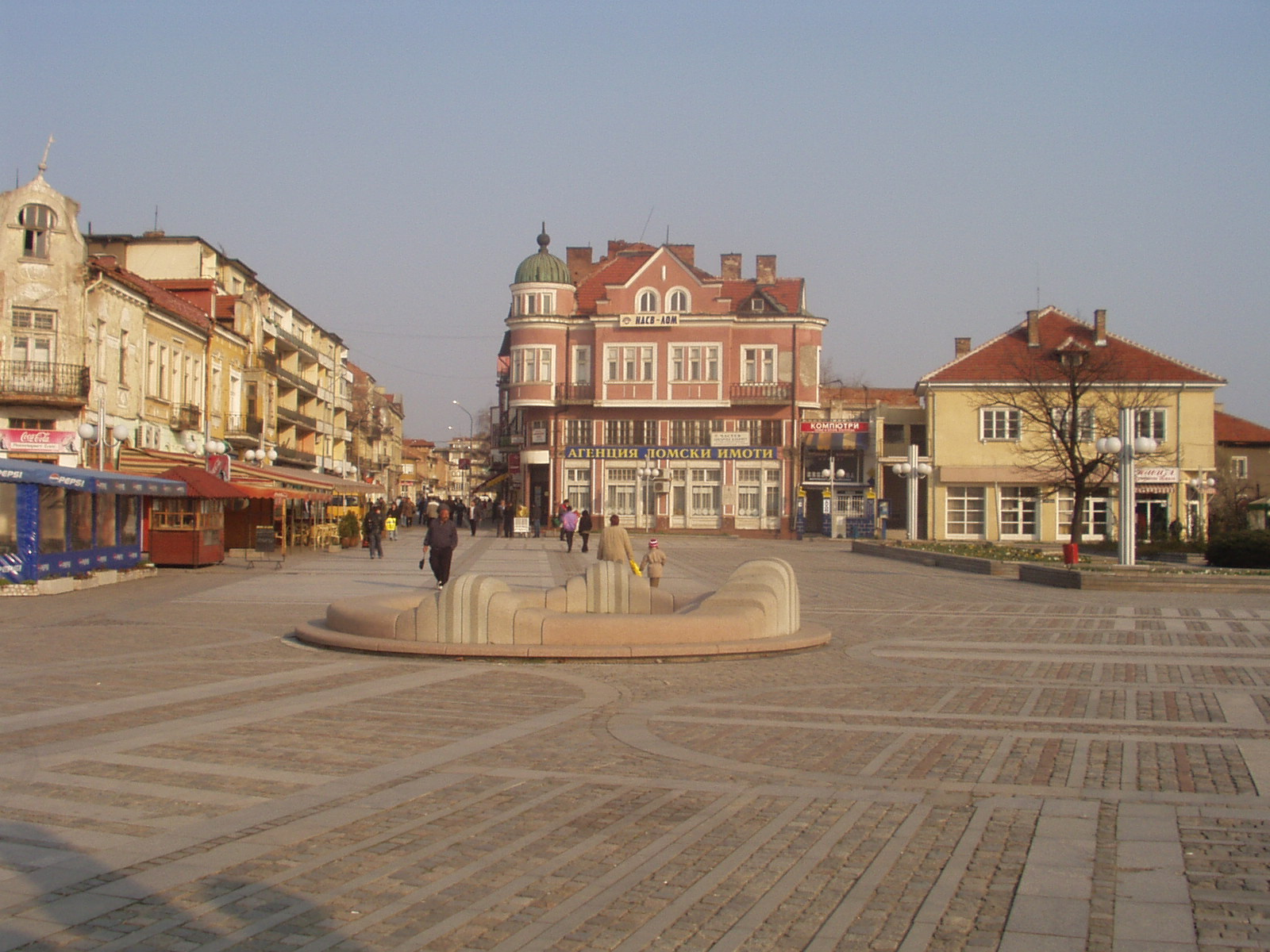 Централен площад "Свобода", Лом Автор: Стефан Каракашев Дата: 16 Март 2007